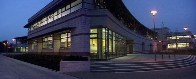 Letterkenny IT